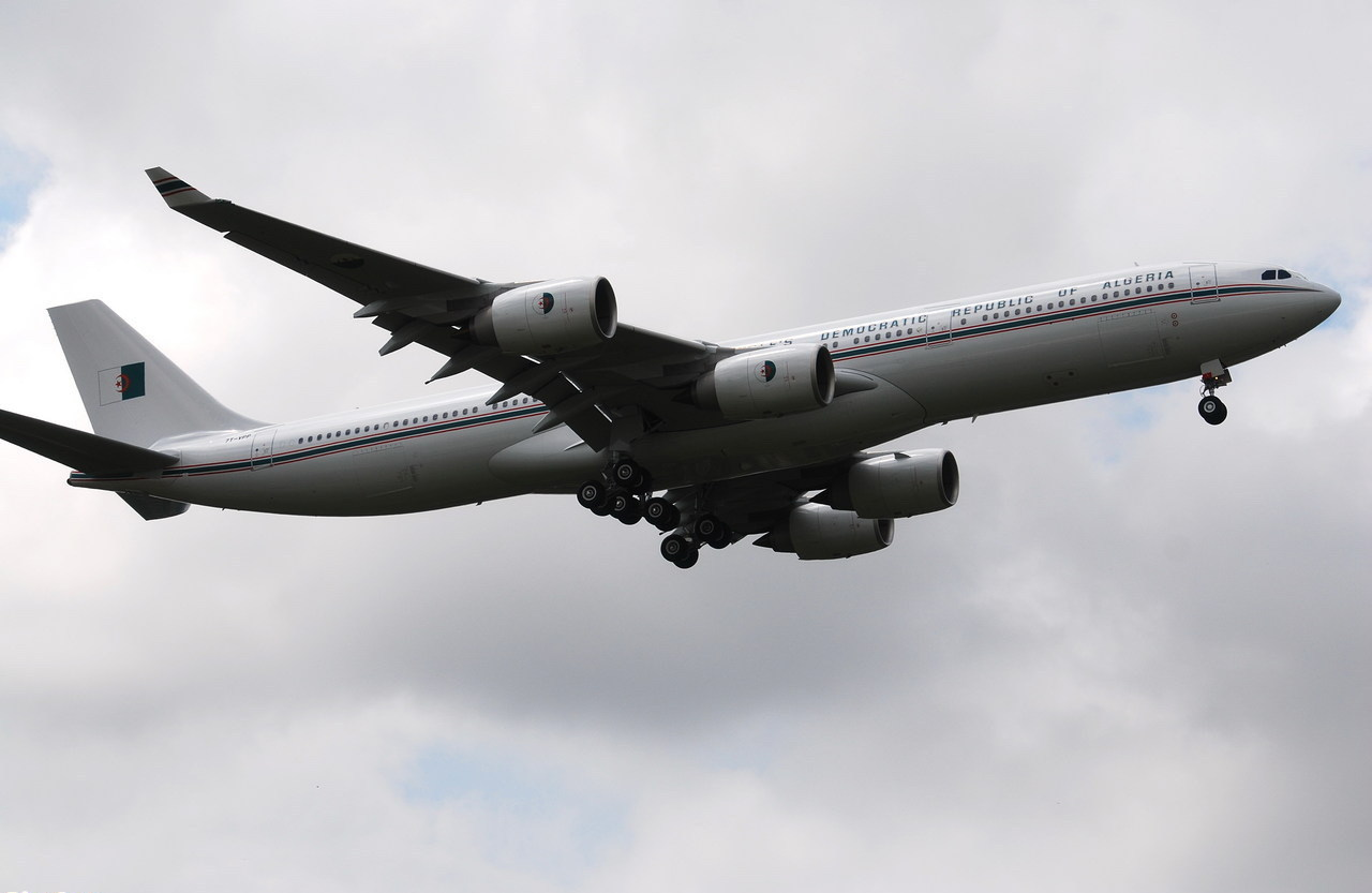 Photo prise à l'aéroport de Toulouse-Blagnac (LFBO) en France. Picture take at Toulouse-Blagnac Airport (LFBO) in France.